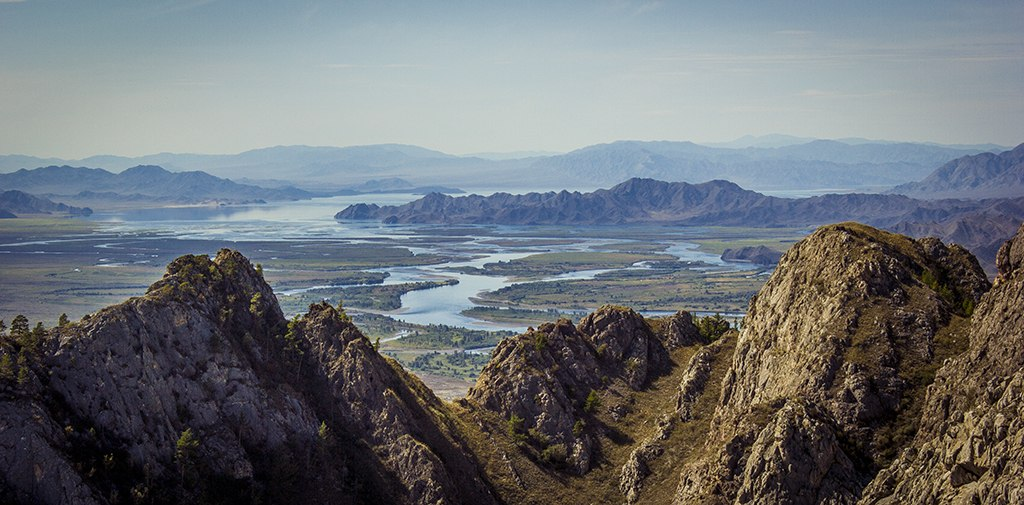 Тыва дыл: Хайыракандан дагдан барыын талаже көрүш.